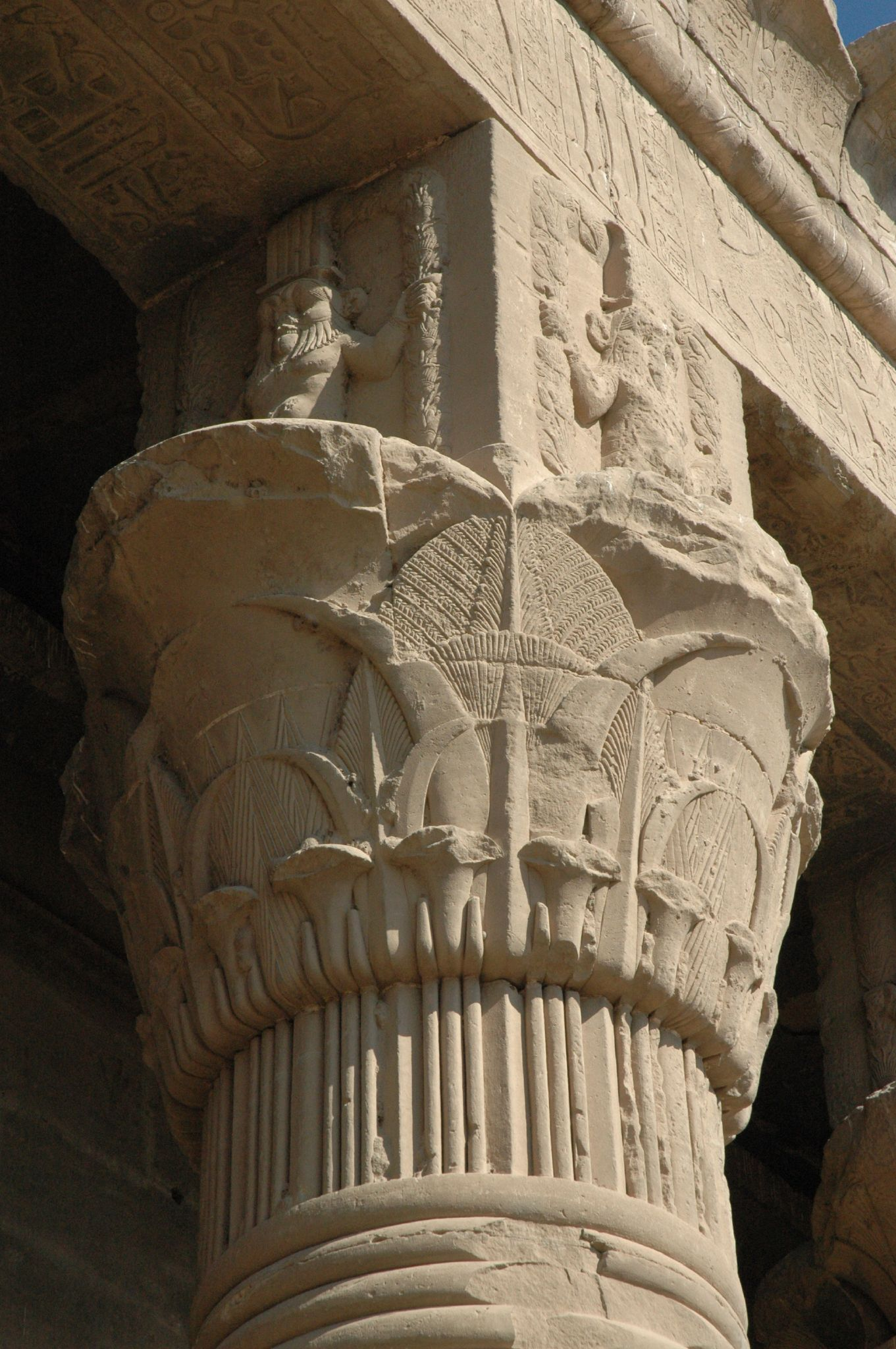 Dendara: tempio di Hator